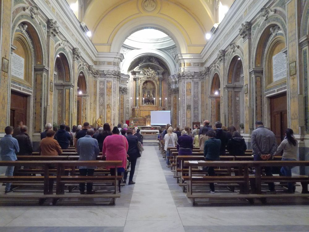 Chiesa di San Giuseppe Maggiore dei Falegnami (Napoli)